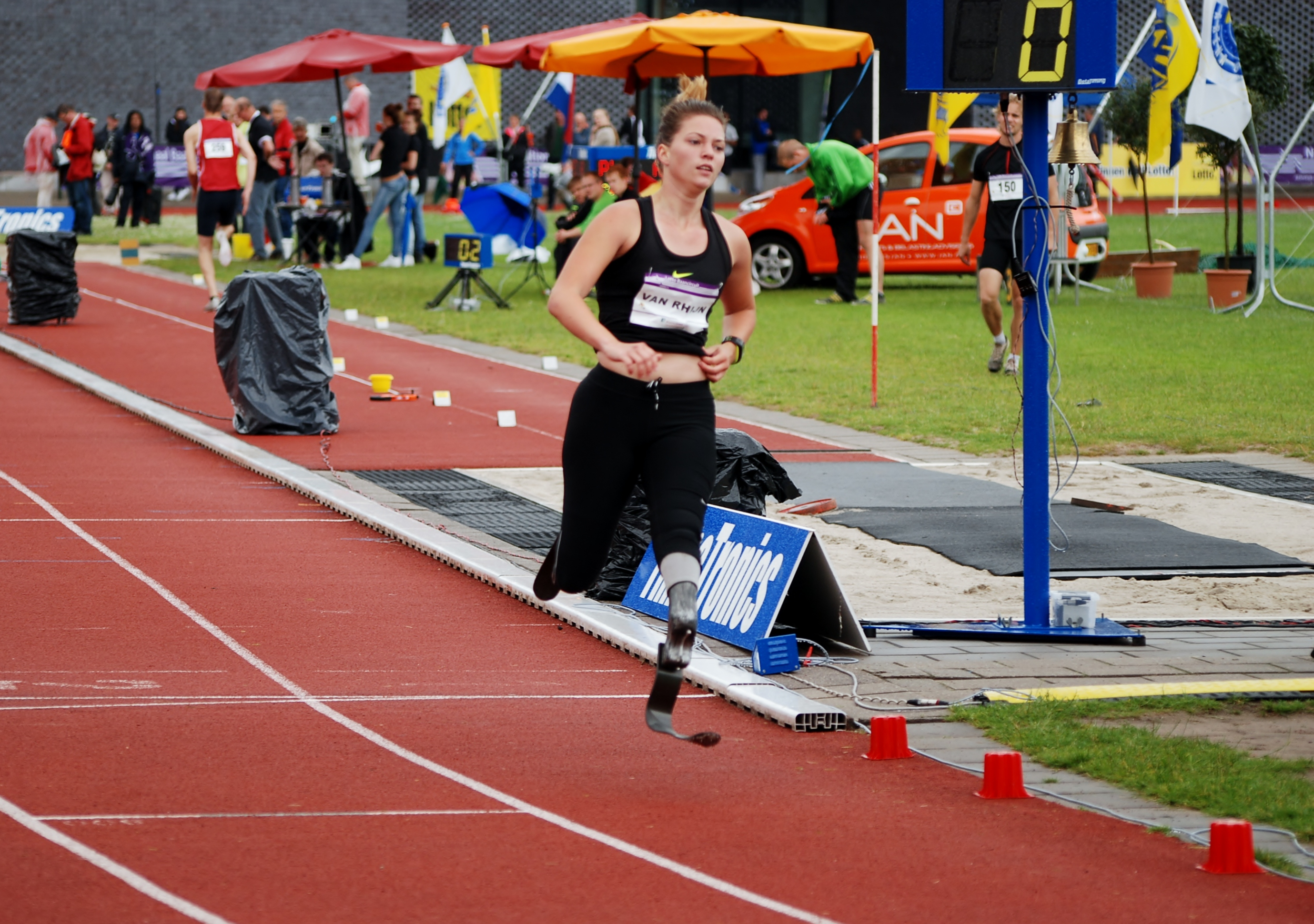 Marlou van Rhijn (Purmerend, 22 oktober 1991) is een Nederlands atlete en voormalig zwemster, die met name gespecialiseerd is in de 100 en 200 m sprint.